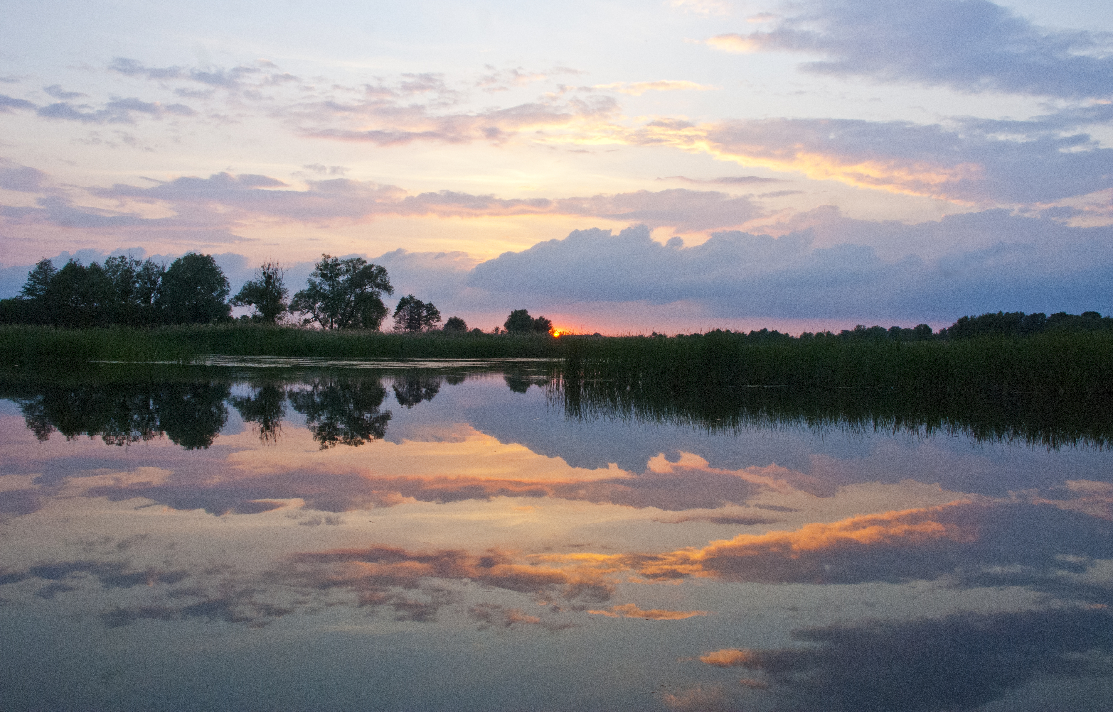 «Саварка», село Лютари, река "РОСЬ"